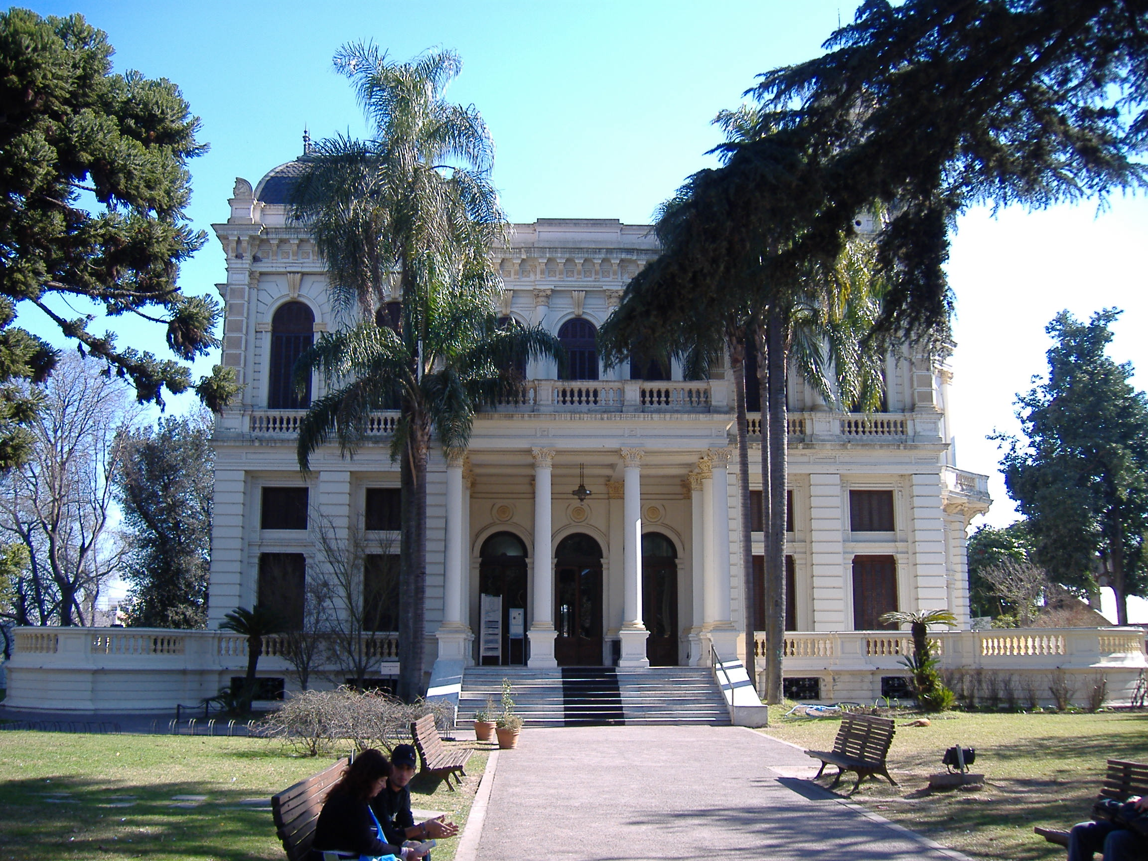 Villa Hortensia, an old mansion in Barrio Alberdi, Rosario, Argentina.